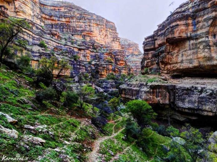 شیرز کوهدشت